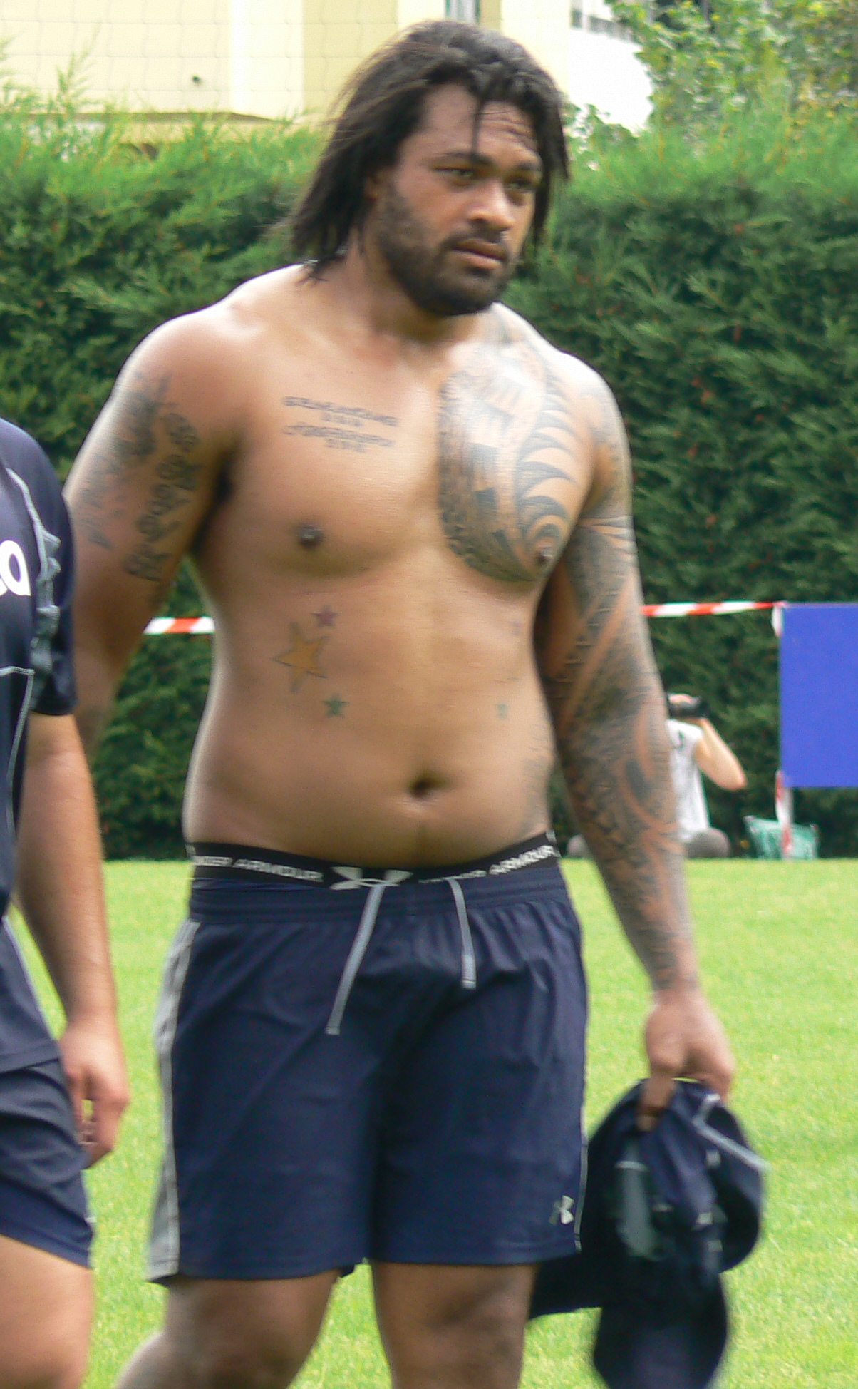 Le rugbyman néo-zélandais Sione Lauaki lors d'une entrainement avec l'ASM Clermont Auvergne.